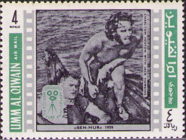 Ben Hur (1959 film)